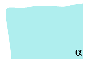 Plano Dibujo original de Larocka